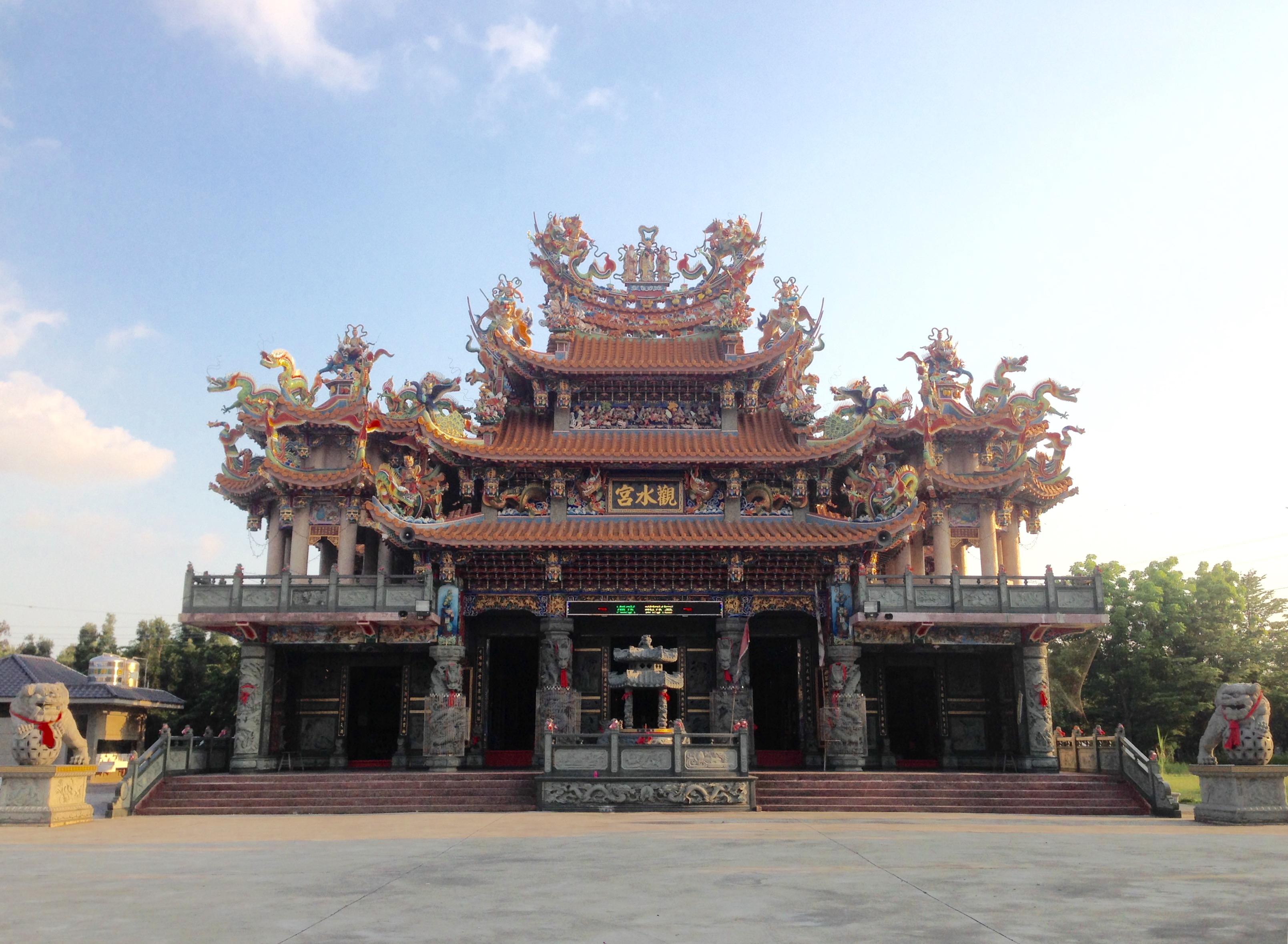 中文（台灣）: 滾水觀水宮